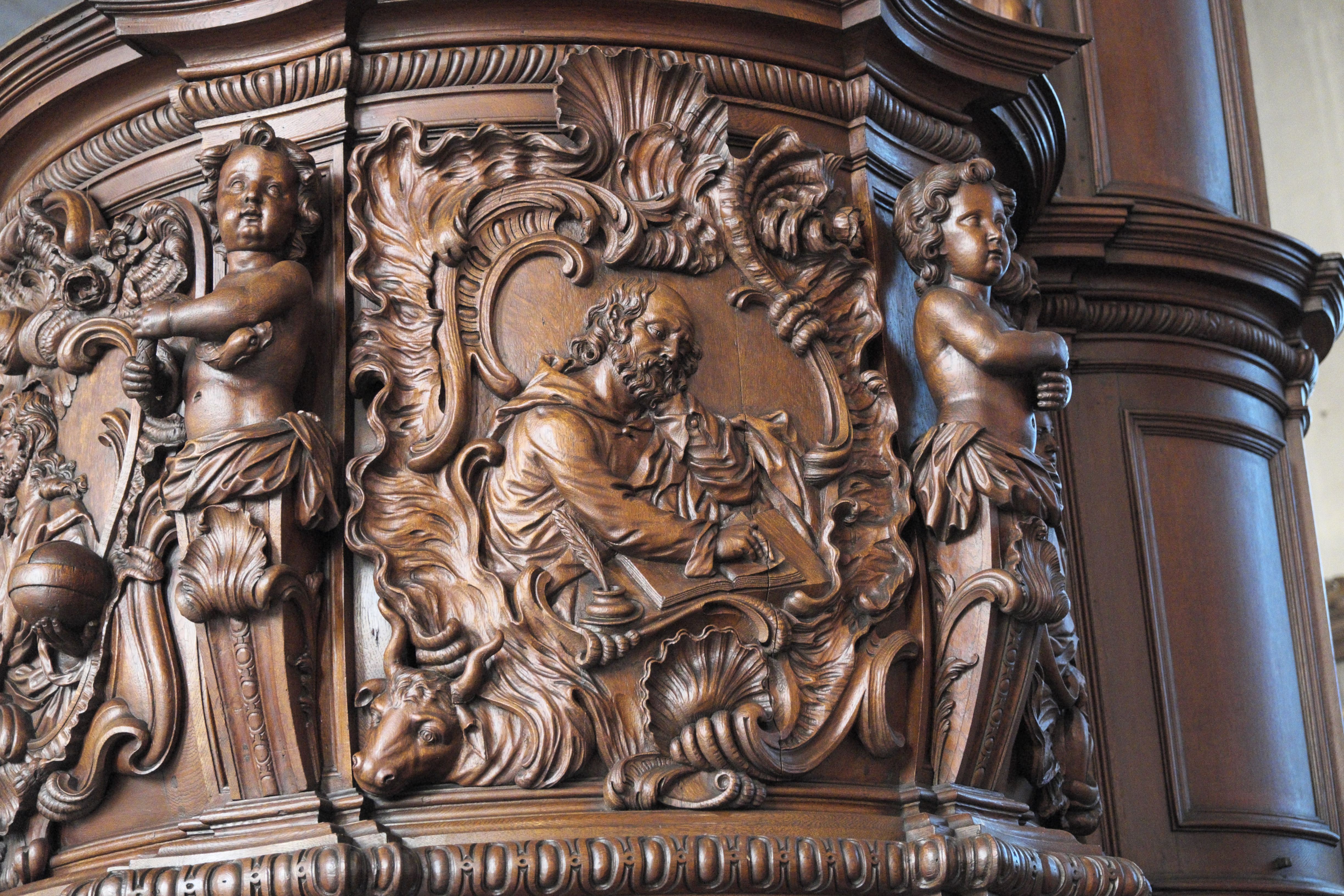 Kirche Saint-Vaast in Hondschoote im Département Nord (Hauts-de-France/Frankreich), Kanzel